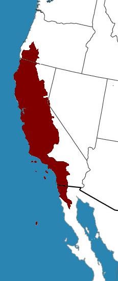 Carte de la Région floristique de Californie